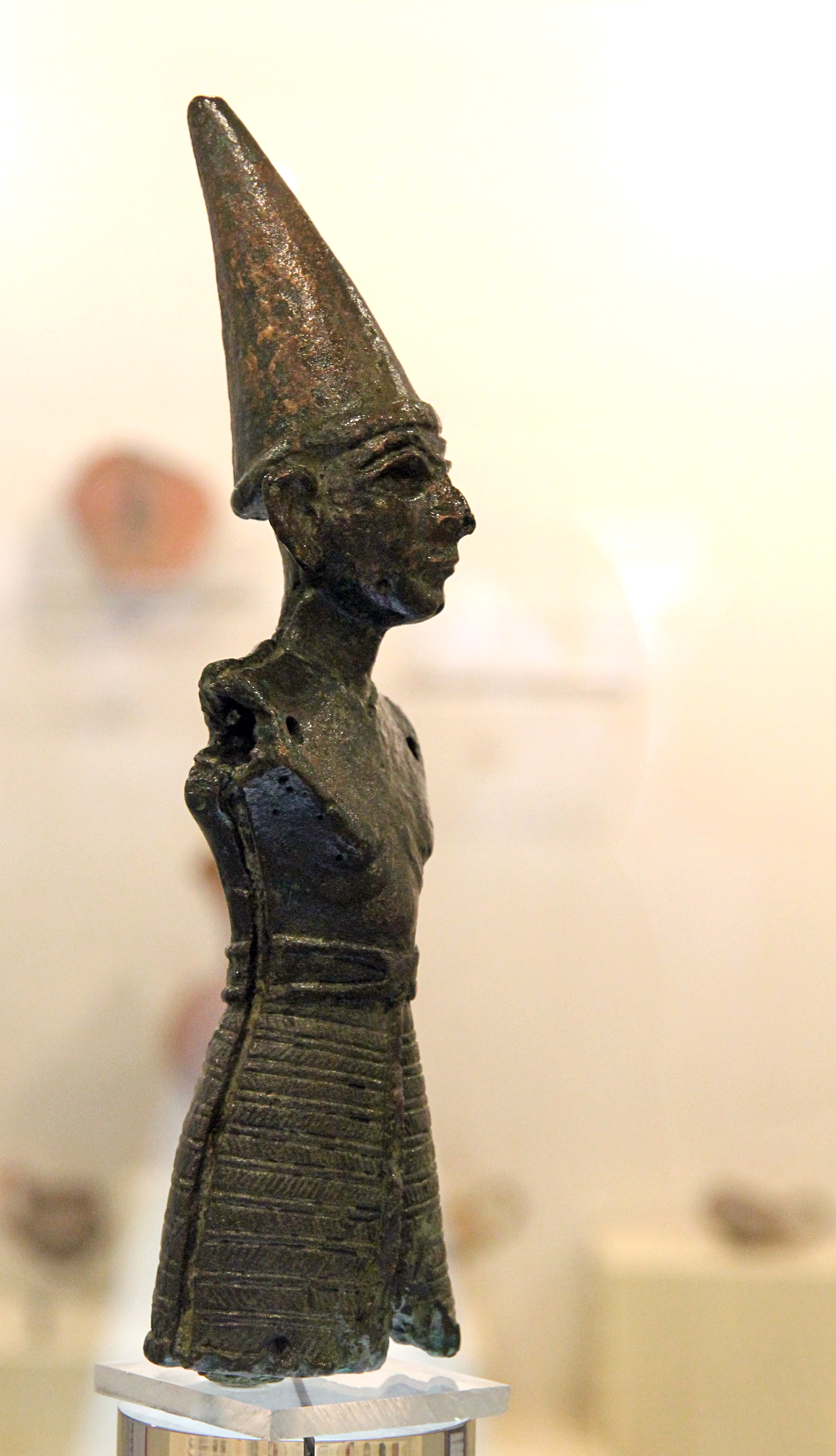 Bronzefigurine des Wettergottes im Archäologischen Museum von Amasya, Nordtürkei